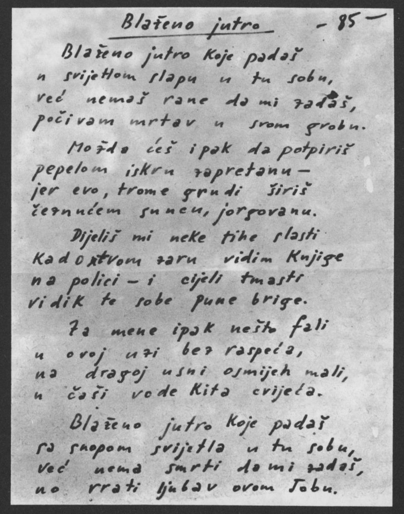 Rukopis Ujevićeve pjesme "Blaženo jutro"